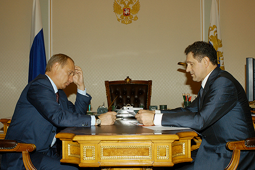 Владимир Путин, Александр Волков